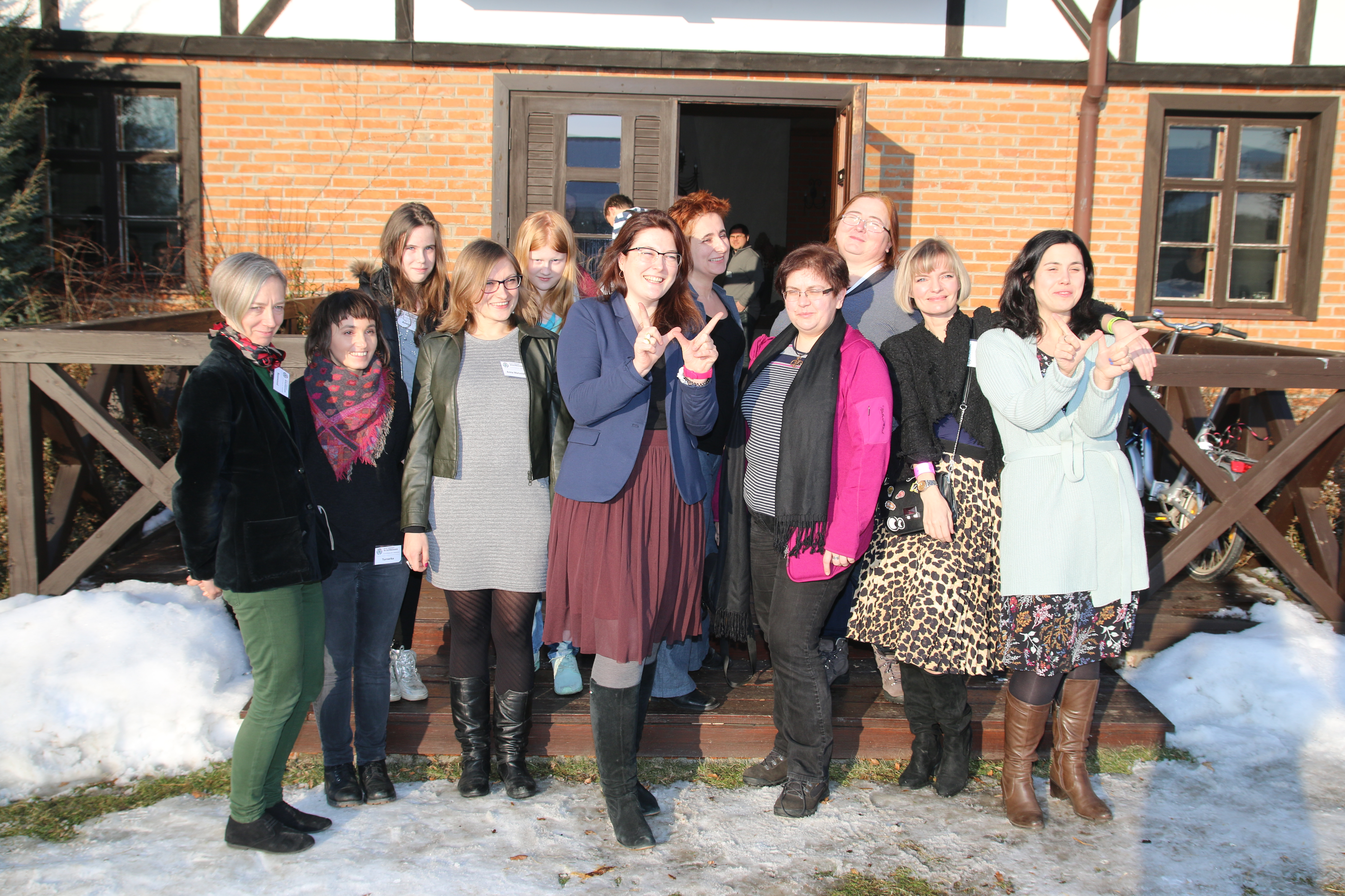 Zlot Zimowy w Tworzyjankach 2017